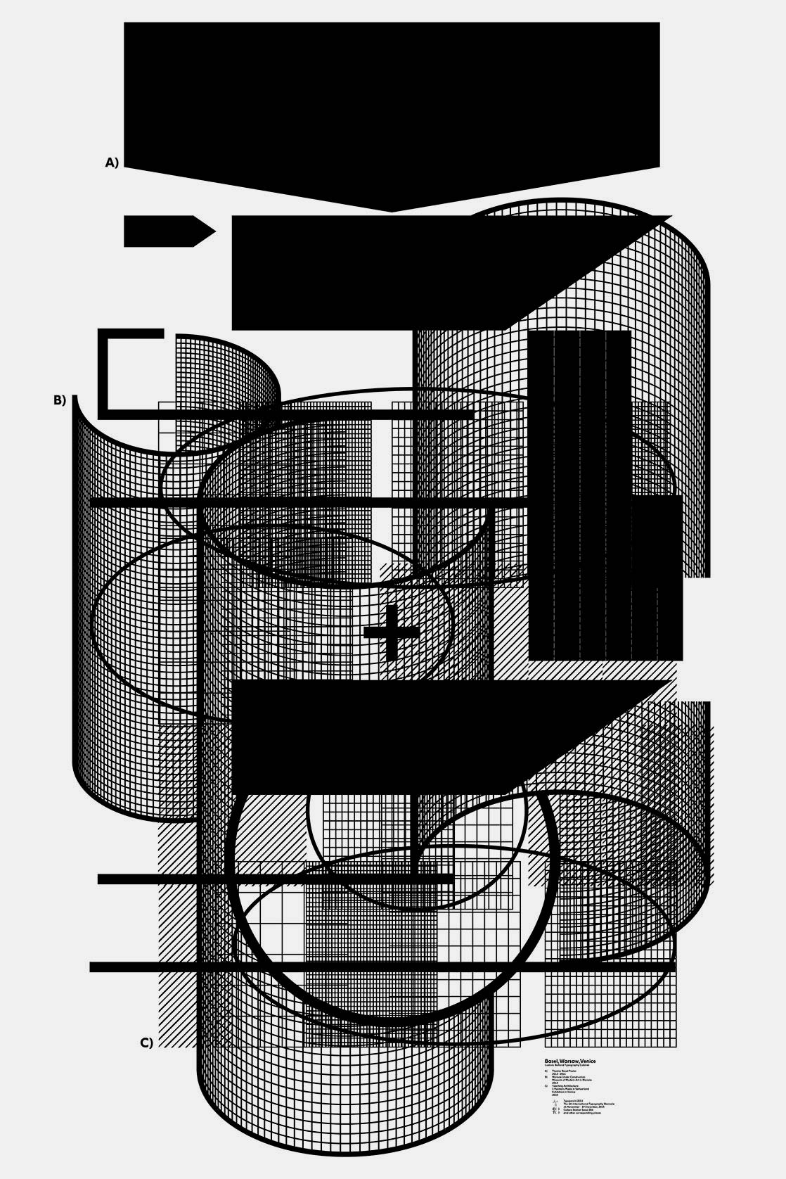 Typojanchi 2015 – International Typography Biennale – Poster Contribution